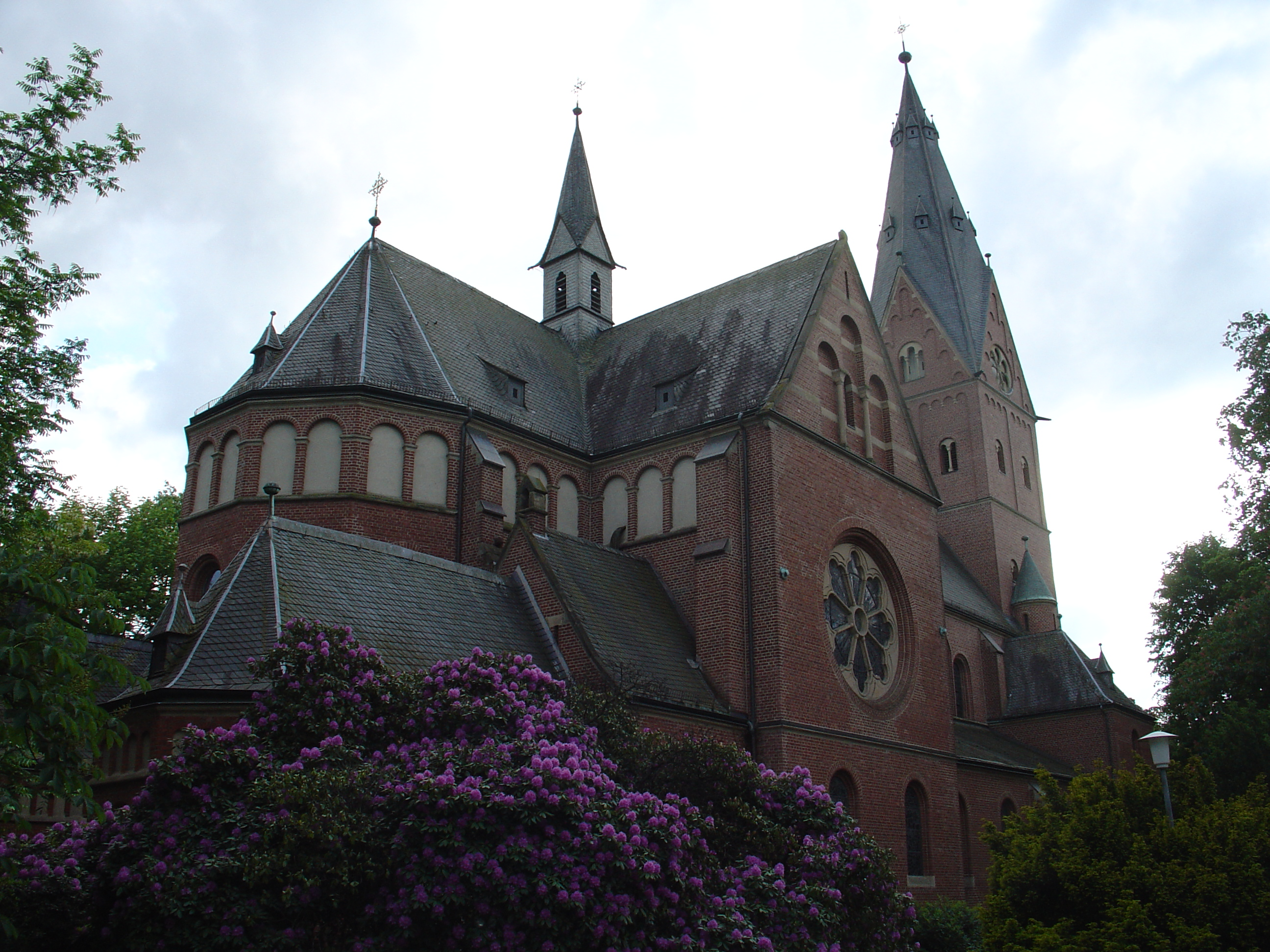 St. Pankratius Gütersloh, katholische Pfarrkirche This is a photograph of an architectural monument.